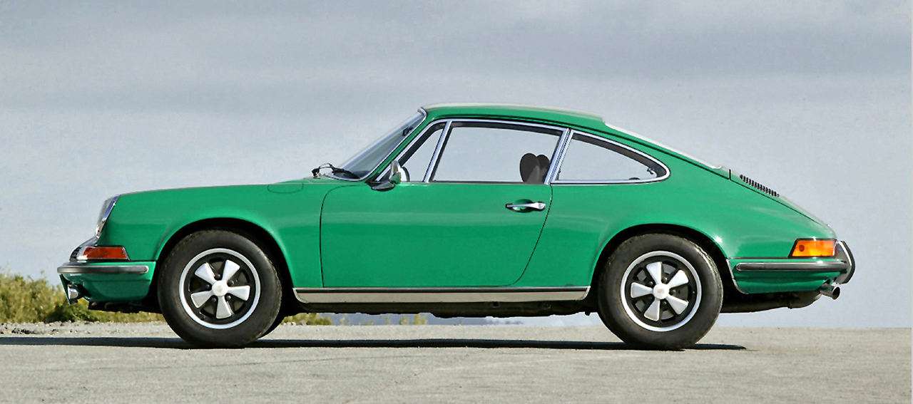 1974 Porsche 911 2.4